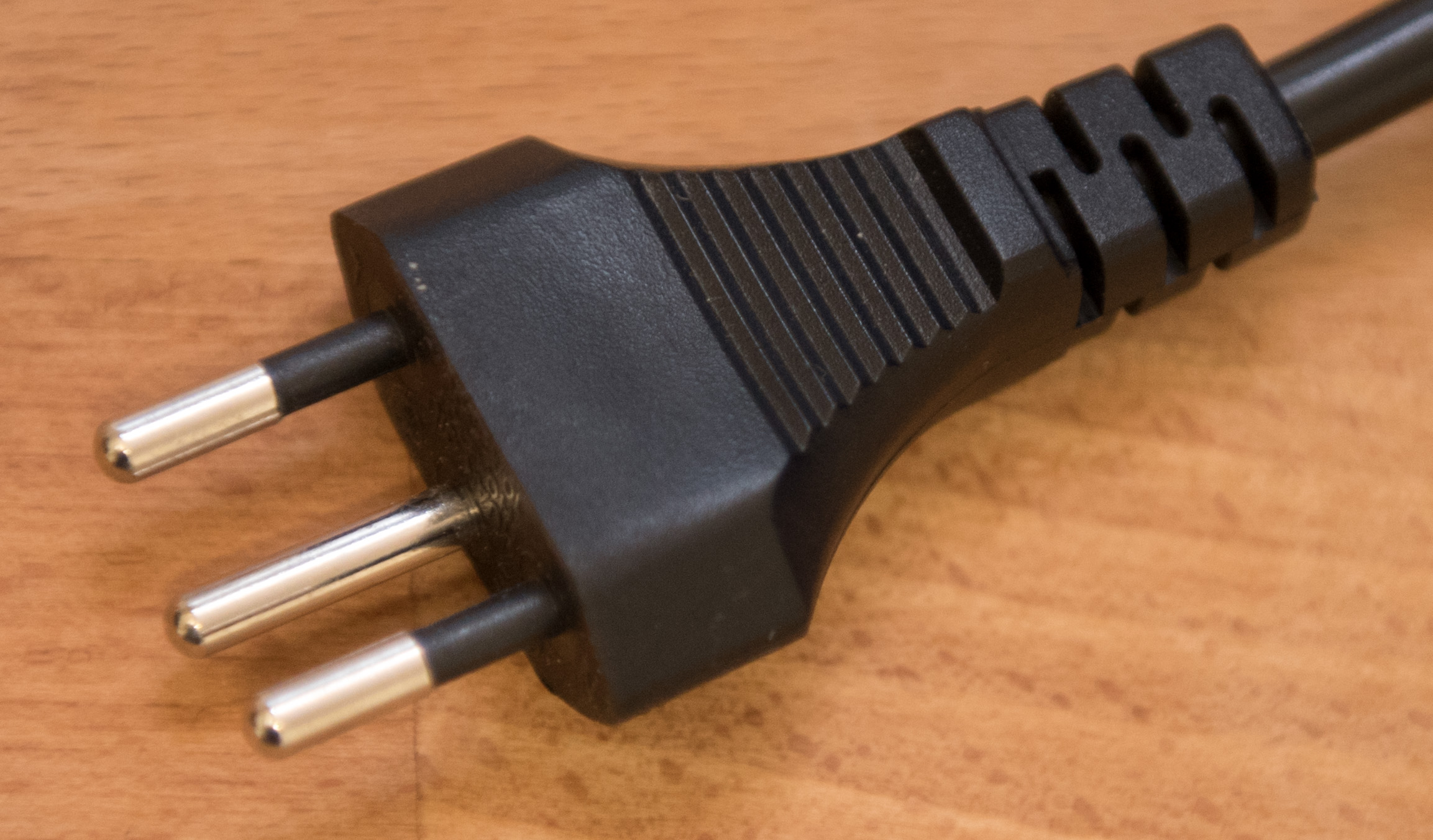 Stecker nach der Norm SEV 1011:2009, T12